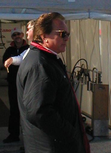 Reinhold Joest at Petit Le Mans in 2003.